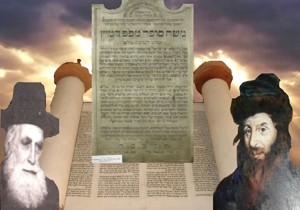 Rabbi Moshe Sofer založil v Pressburgu – Bratislave známu Talmudickú školu "Yeshivat Ha´Rama" vyššiu školu pre štúdium Talmuda, ktorej žiaci boli priznaní autoritami a ktorí, prakticky všetci slúžilli ako Rabíni komunít po ukončení štúdií v Yeshive v Slovenských a Maďarských židovských komunitách. Väčšina z nich boli bilinguálni, hovorili plynule Nemecky a Maďarsky. Boli oslobodení od vojenskej služby. Shmuel Daum (1924 – 2003) mal privilégium študovať pod vedením Rabína Akivy Sofer v poslednom roku pred vypuknutím 2. svetovej vojny. Obom sa podarilo zachrániť do Eretz Yisrael, kde sa opät spolu stretli.